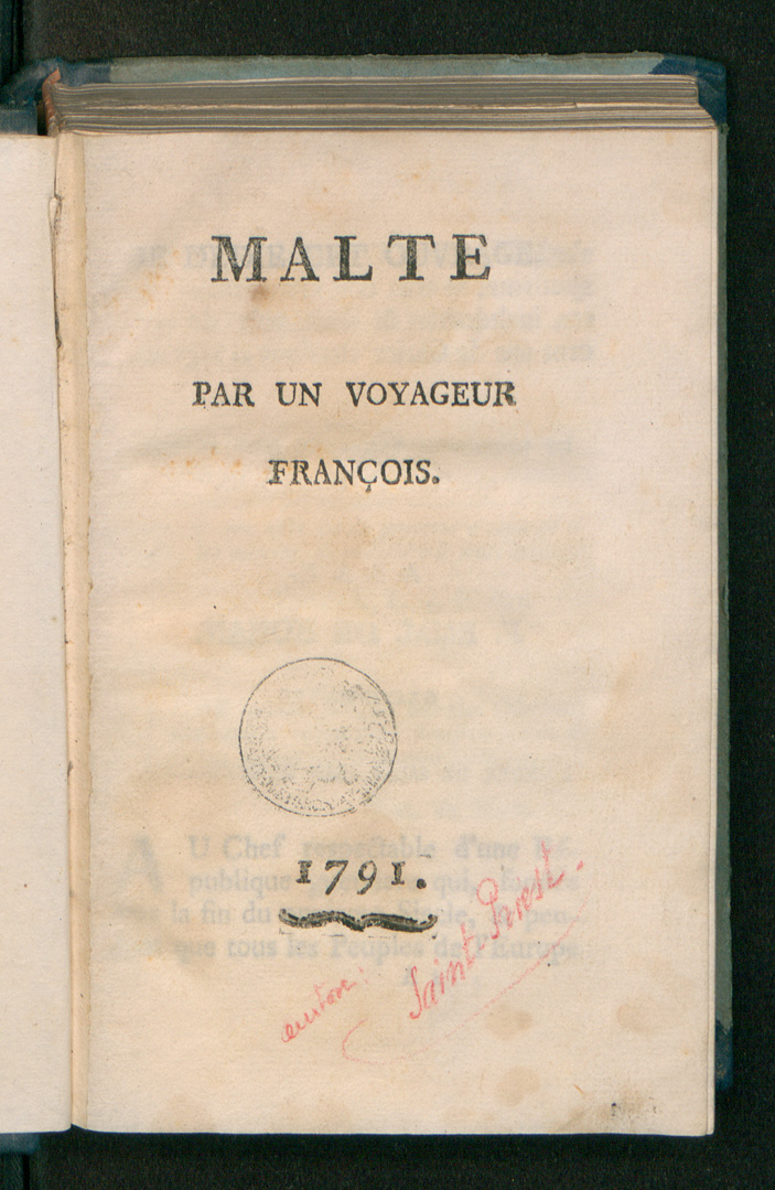 Malte